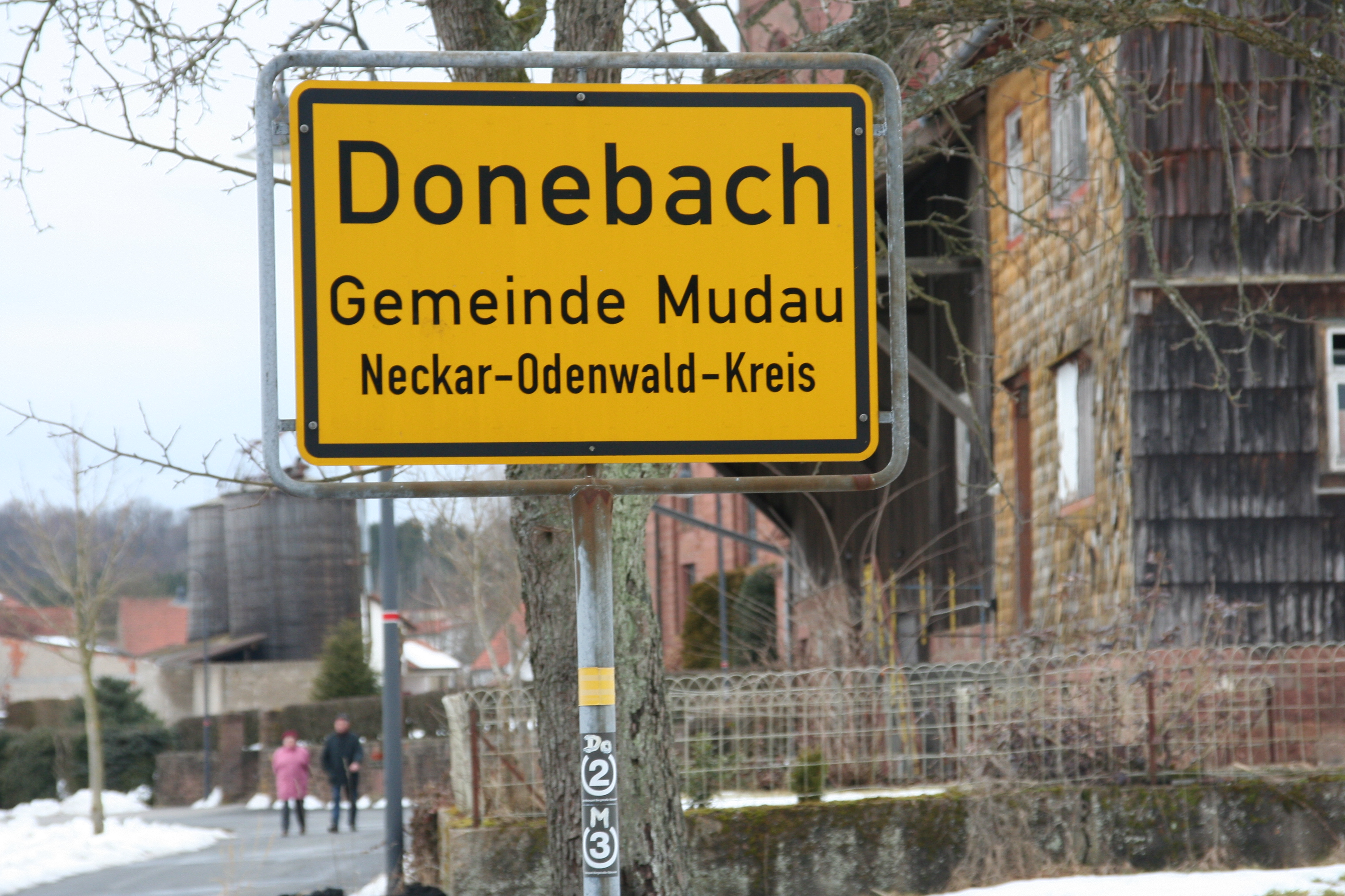 Ortstafel von Donebach